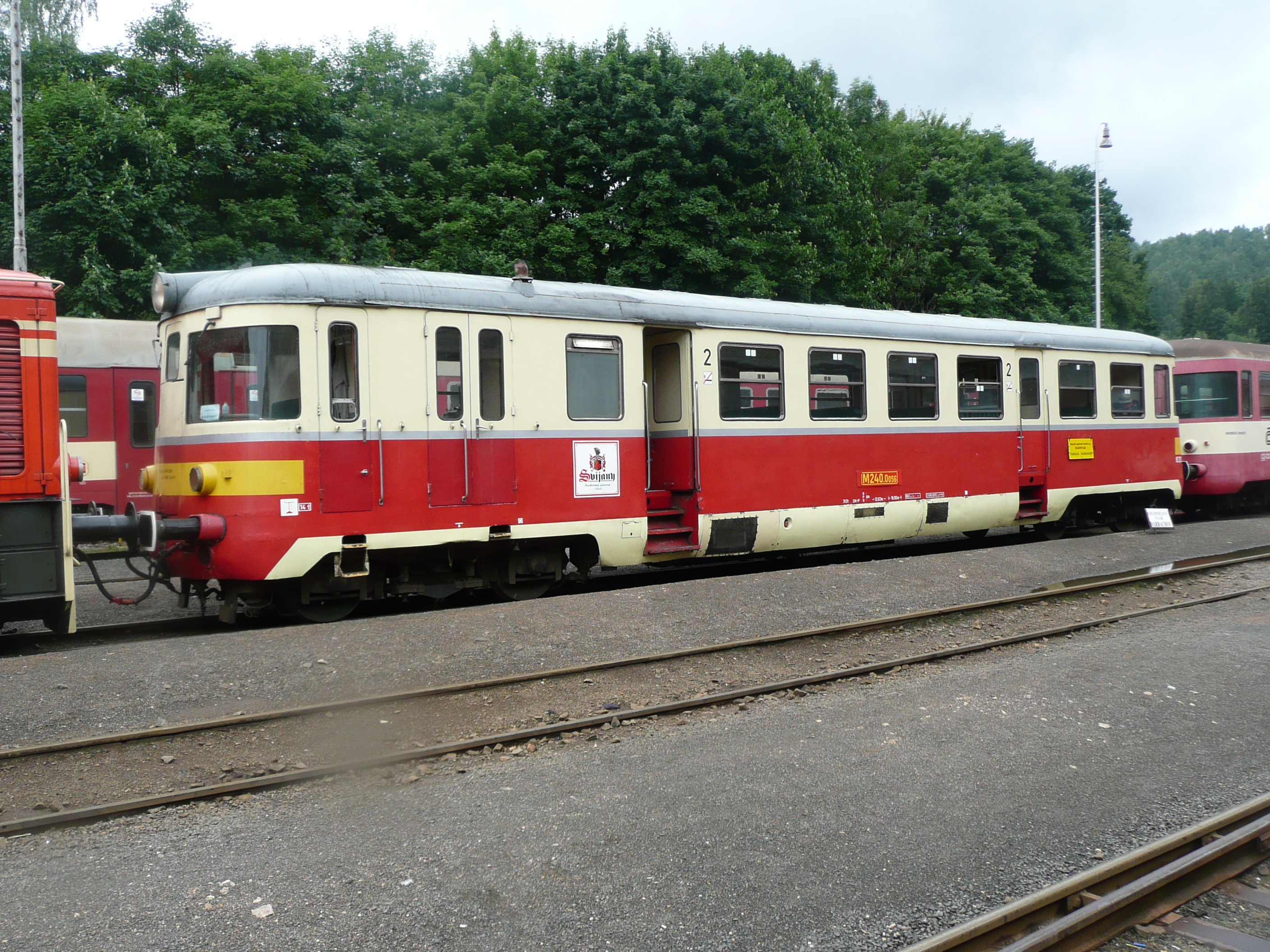 M 240.0056 auf Sonderzugeinsatz auf der Tanvalder Zahnradbahn